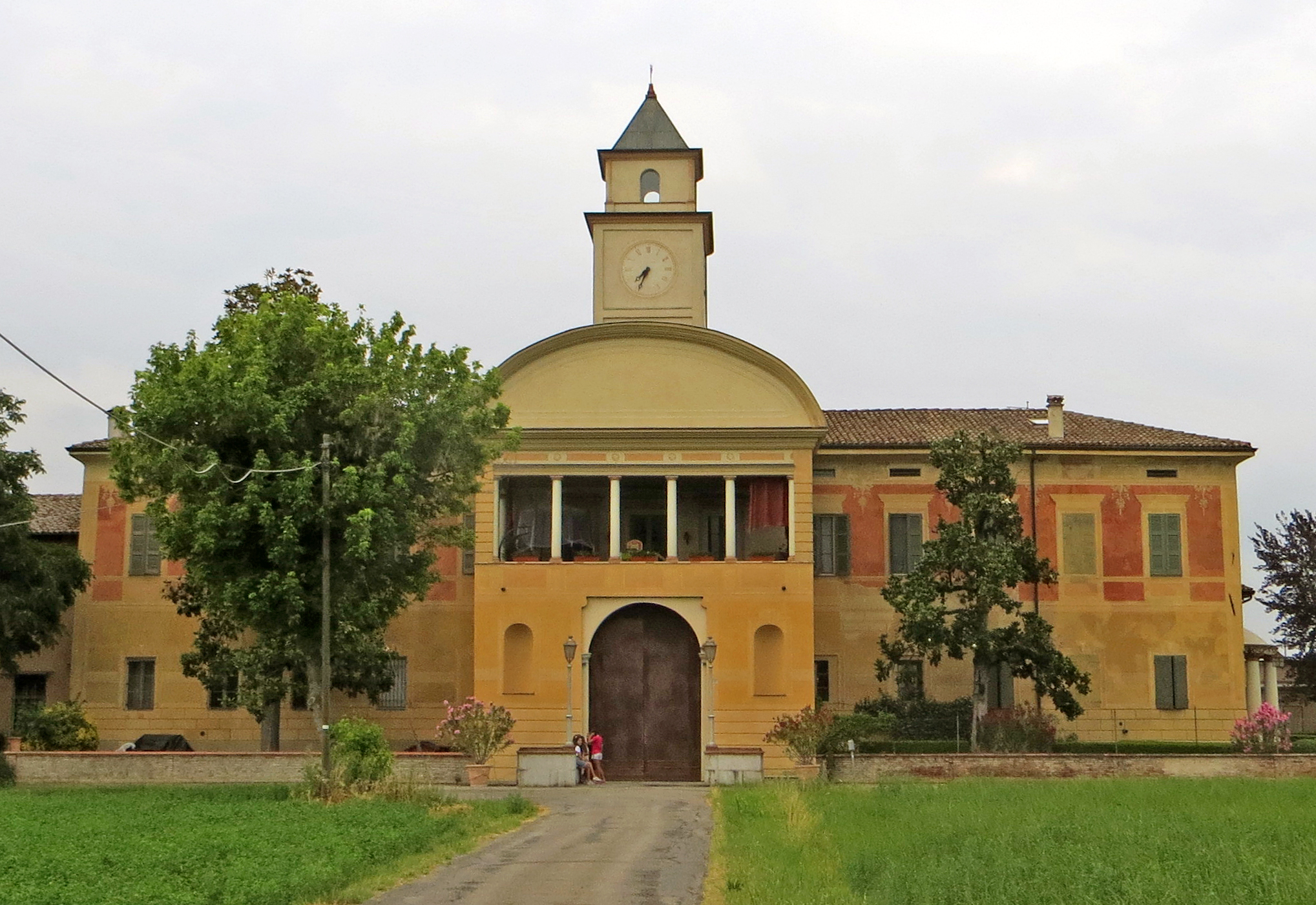 Villa Mattei (San Prospero Parmense, Parma) - facciata